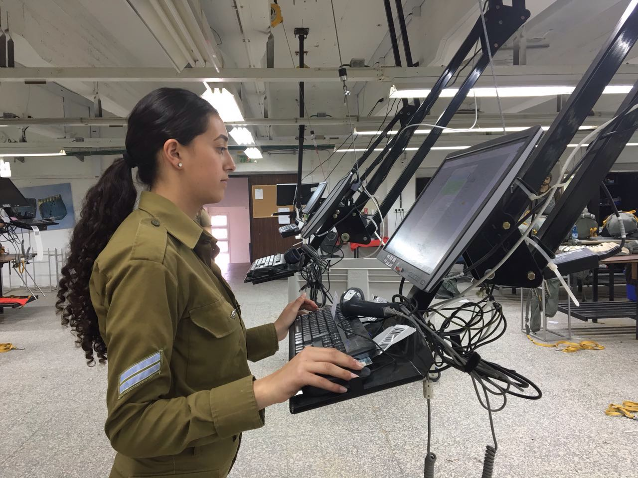 המערכת החדשה של מקפלות המצנחים.